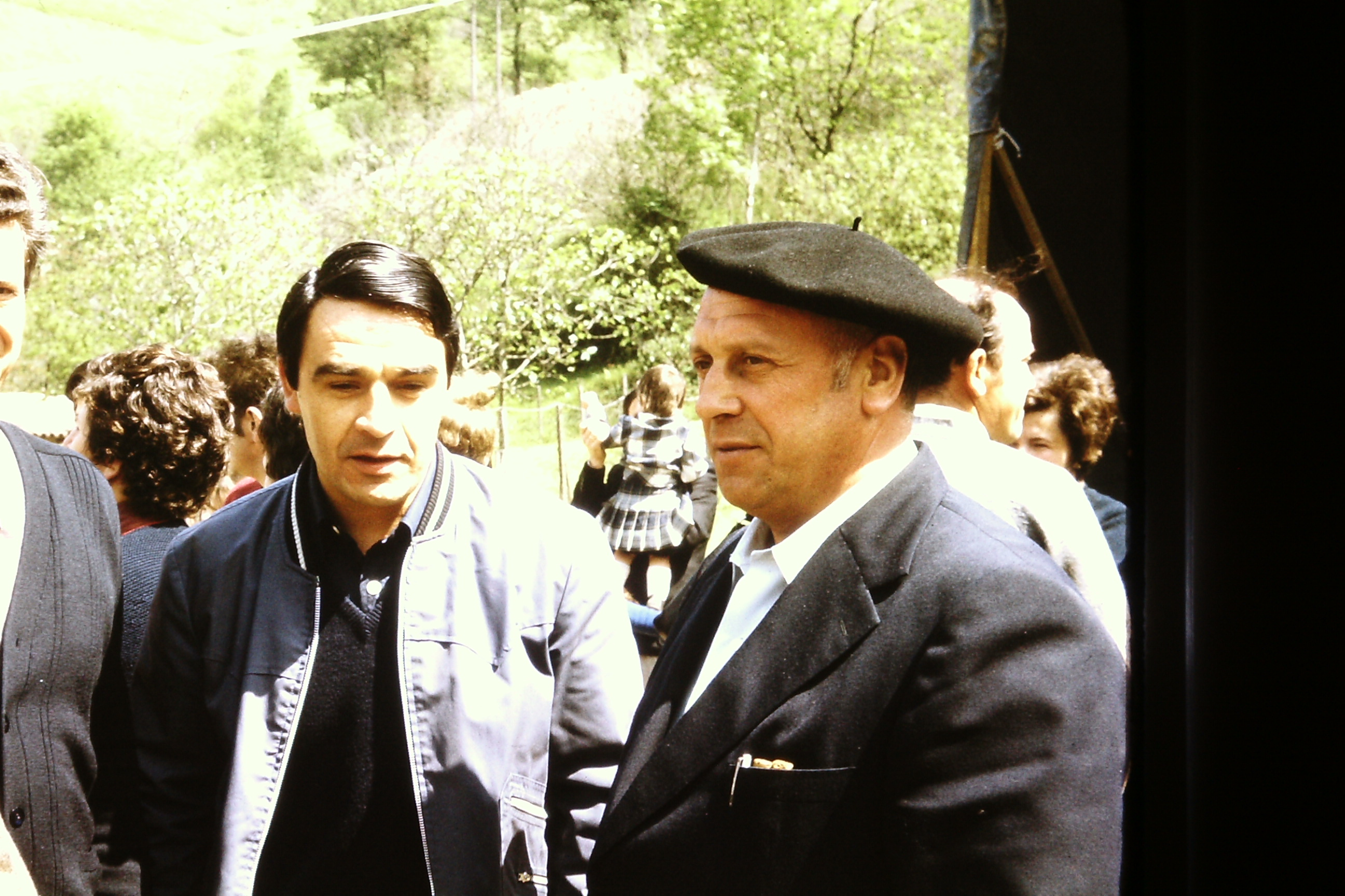 Joxe Lizaso eta Jon Lopategi bertsolariak